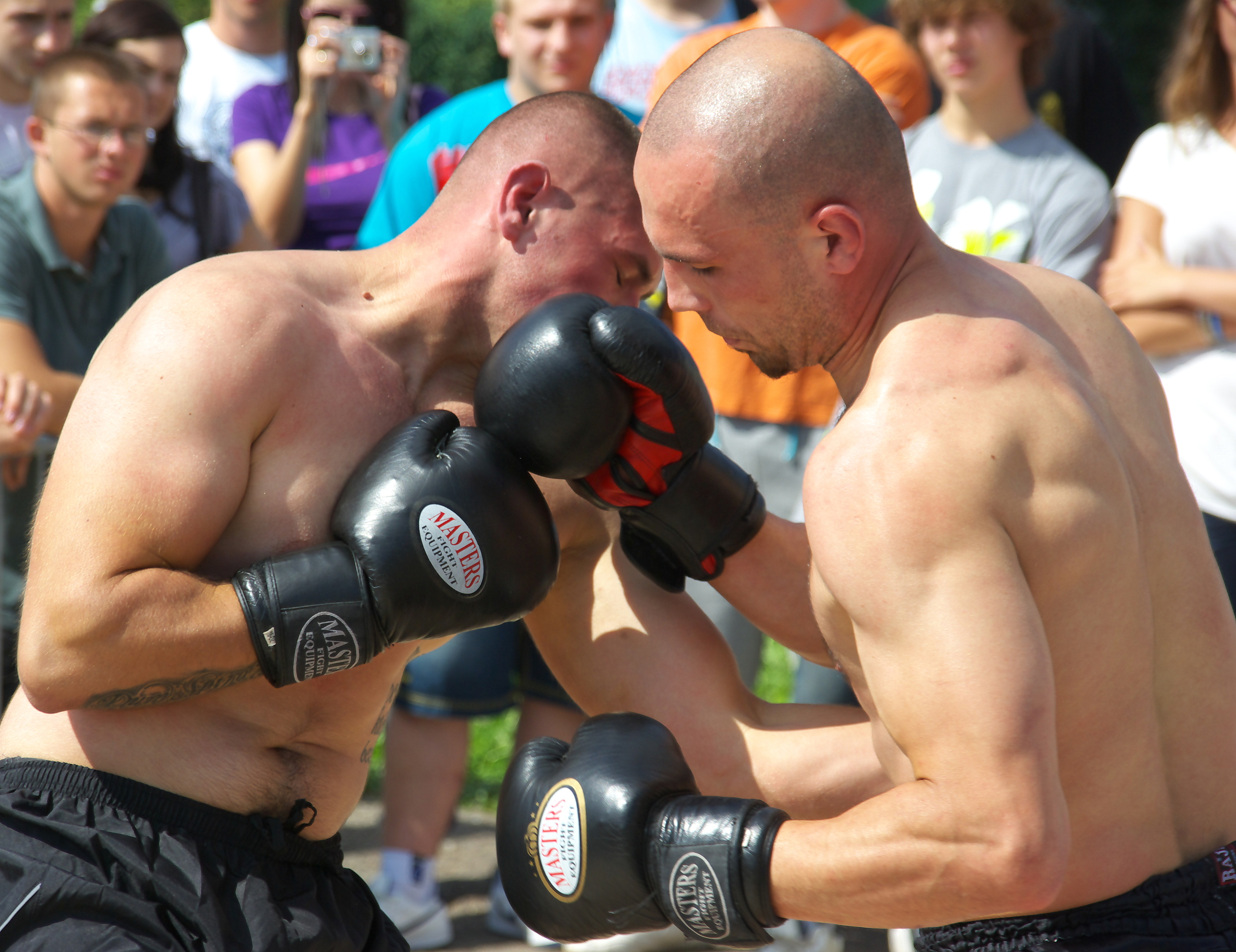 Artur Szychowski podczas pokazowego sparingu kick-boxingu w trakcie imprezy pod nazwą "Dni Ulicy" 20 sierpnia 2011 przy ulicy Sadowej w Sanoku.